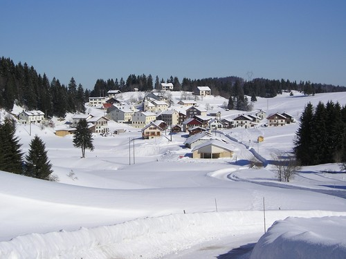 Les Moussières